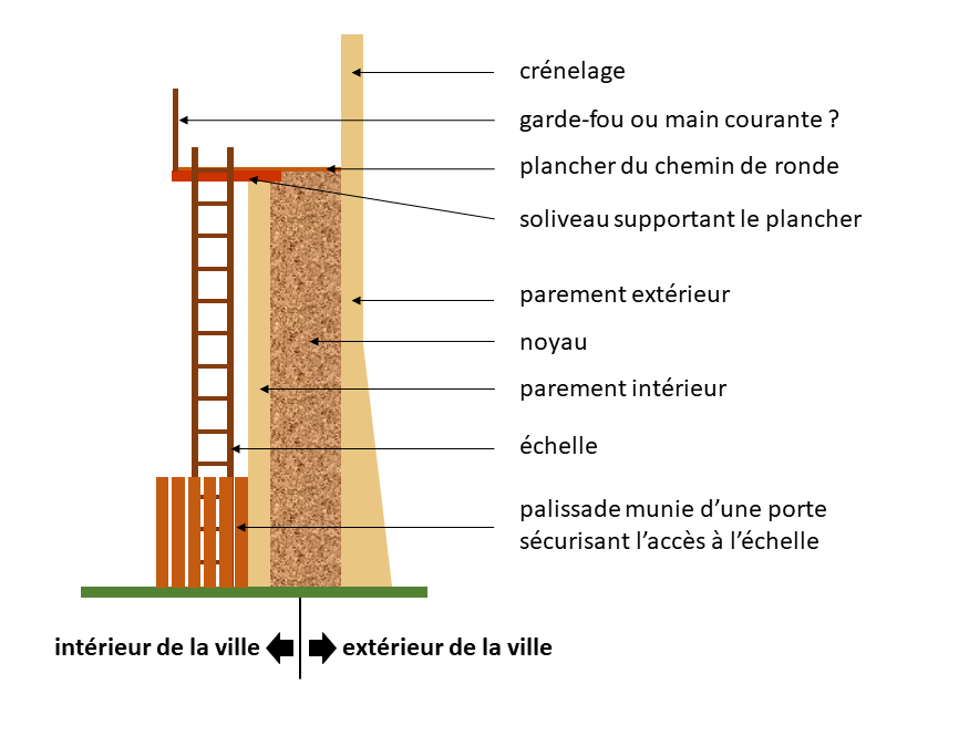 Proposition de restitution d'une coupe de la clouaison de Jean le Bon